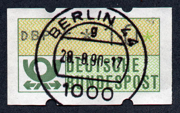 Automaten-Briefmarke der Deutschen Bundespost